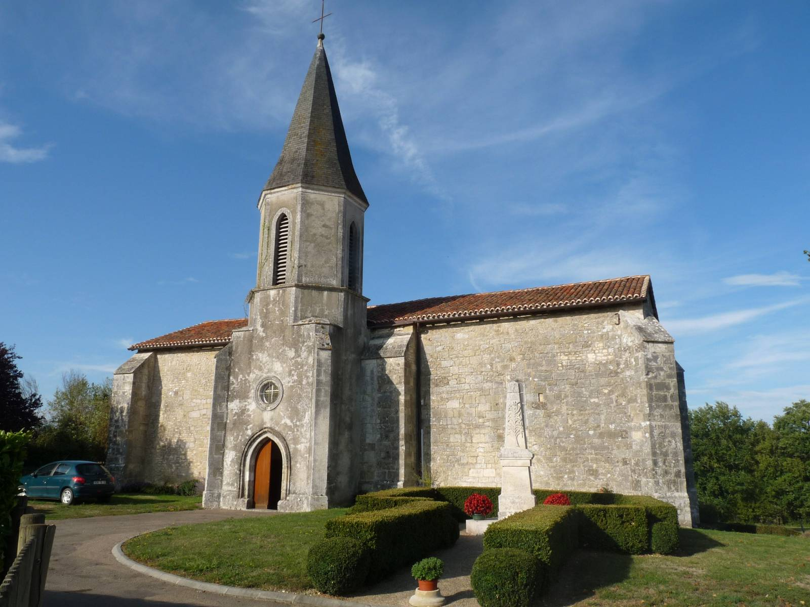 église du Vieux-Cérier, Charente, France